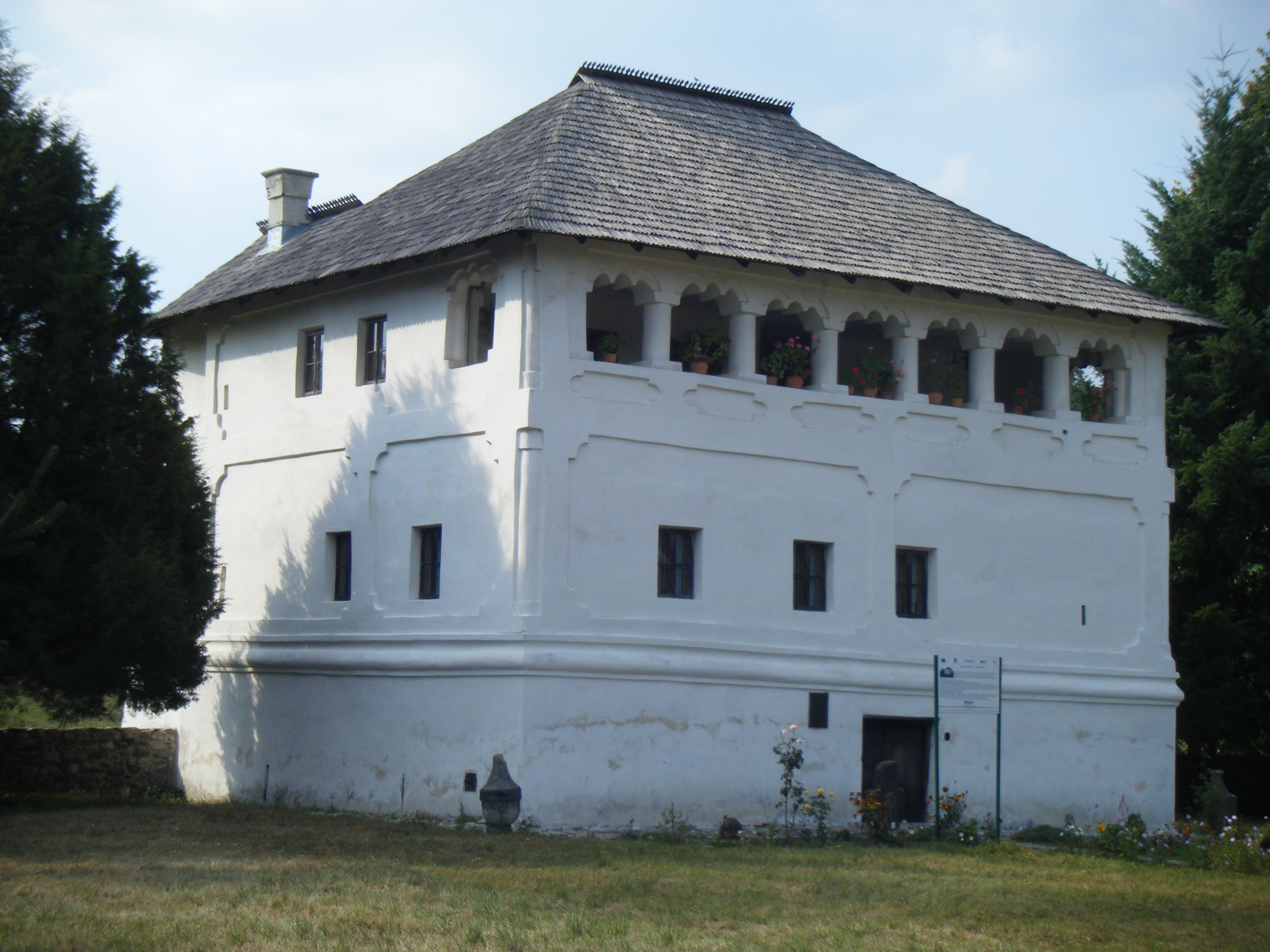 Cula Duca din Maldaresti, achizitionata de I.G. Duca ca si casa de oaspeti pentru prieteni. 01